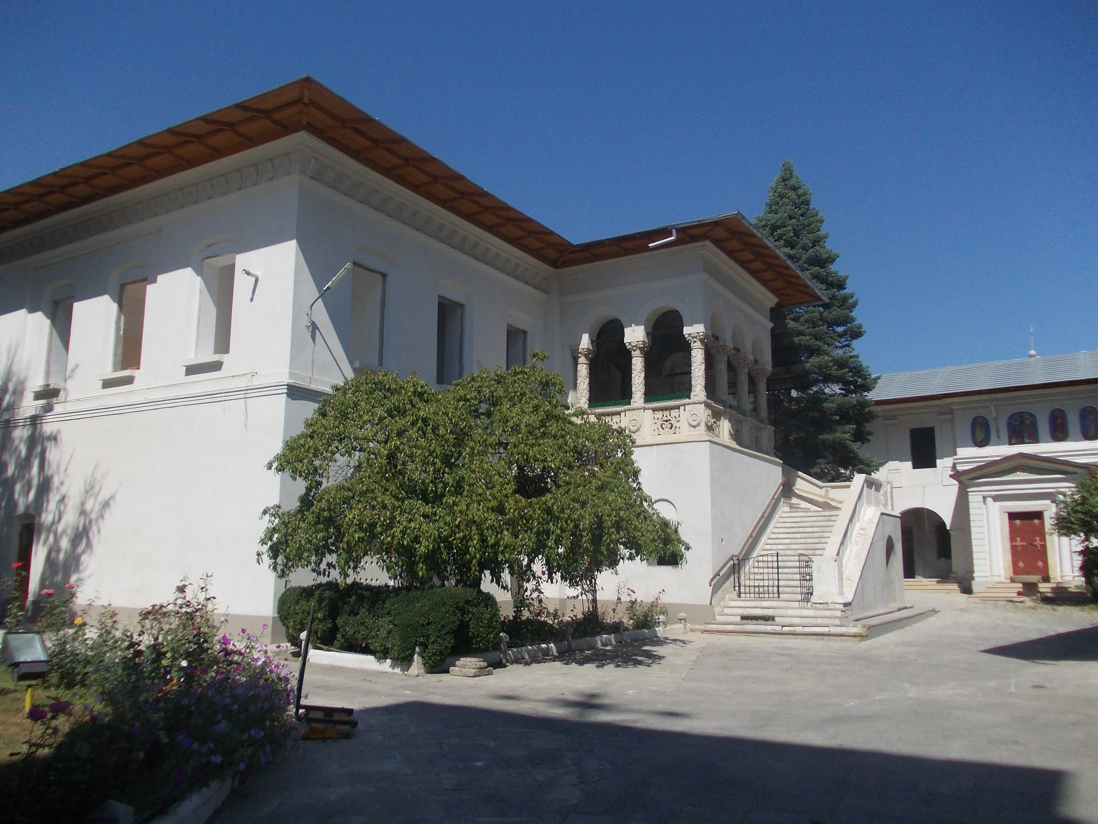 Seminarul vechi din Buzău 04